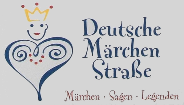 Schild der Deutschen Märchenstraße.